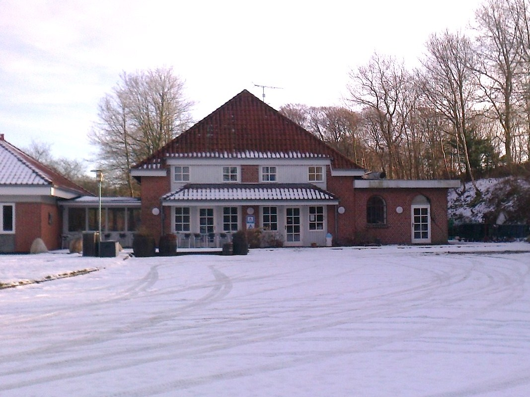 Remisen i Gjerrild, nu vandrerhjem